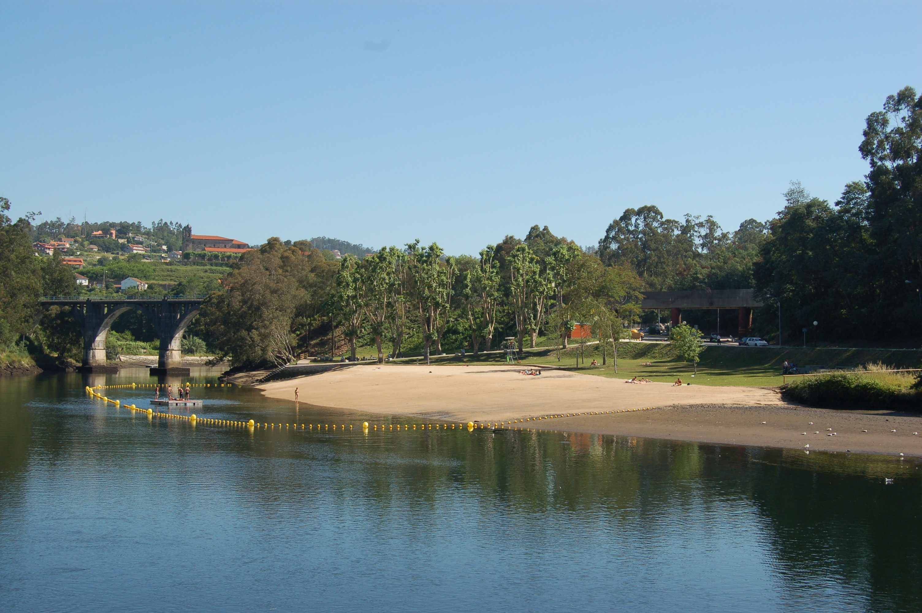 Praia fluvial no río Lérez, en Pontevedra. Ao fondo apréciase o mosteiro de Lérez.